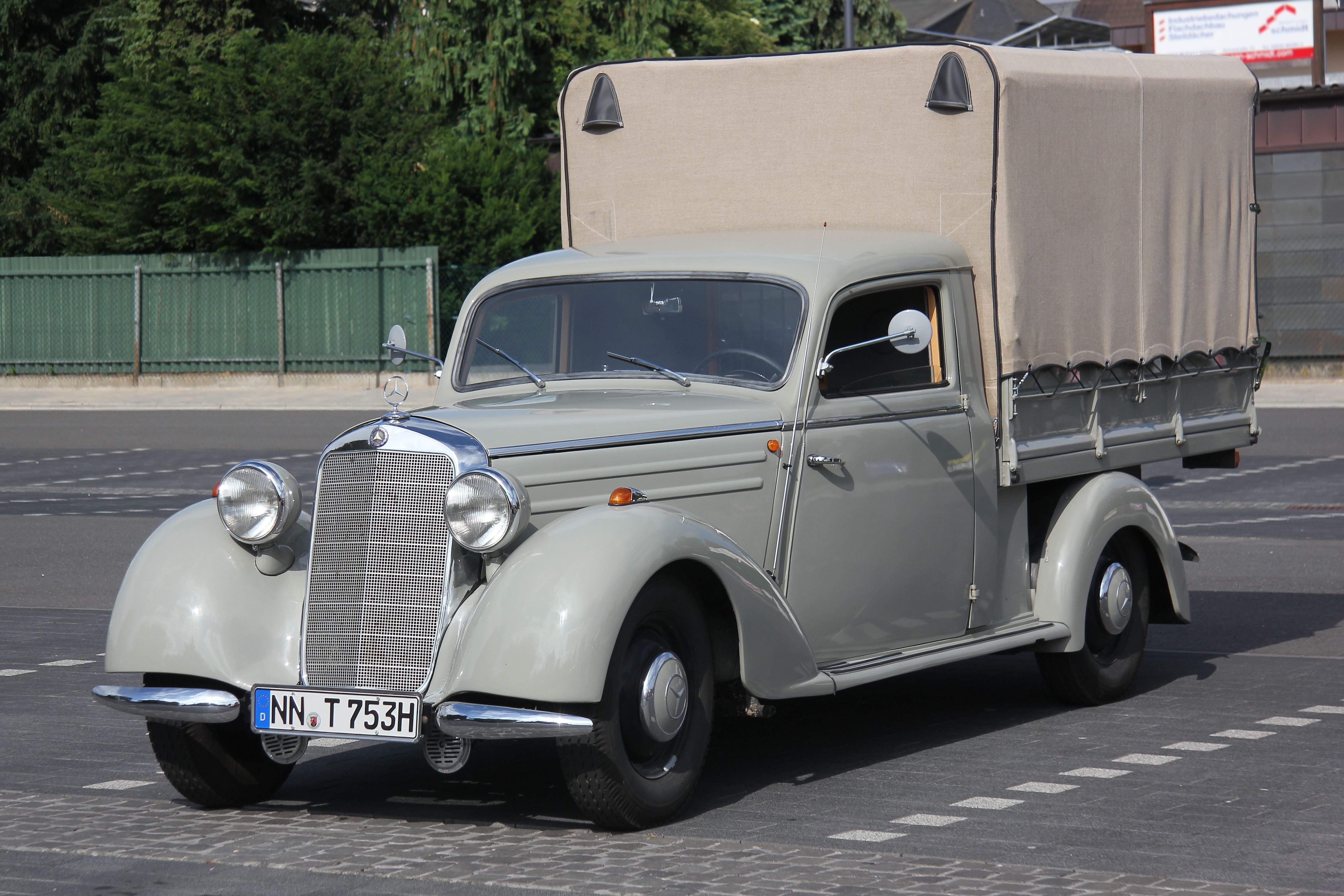 Mercedes-Benz 170, Baujahr 1953, mit Pritsche (fiktives Kennzeichen)